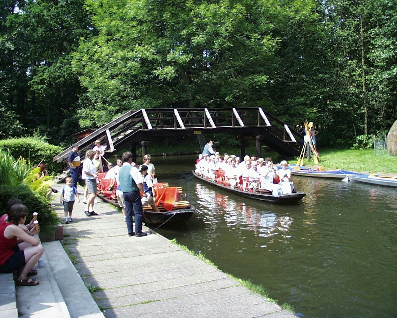 Ein Ausflugskahn im Spreewald am Hafen von Burg